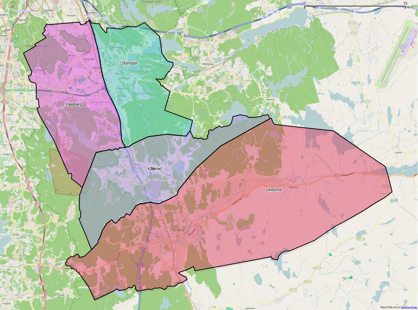 Distriktsindelningen i Mölndals kommun World file: 30.03818036604377539 0 0 -30.03818036604377539 1327877.25613083341158926 7902224.58471160754561424